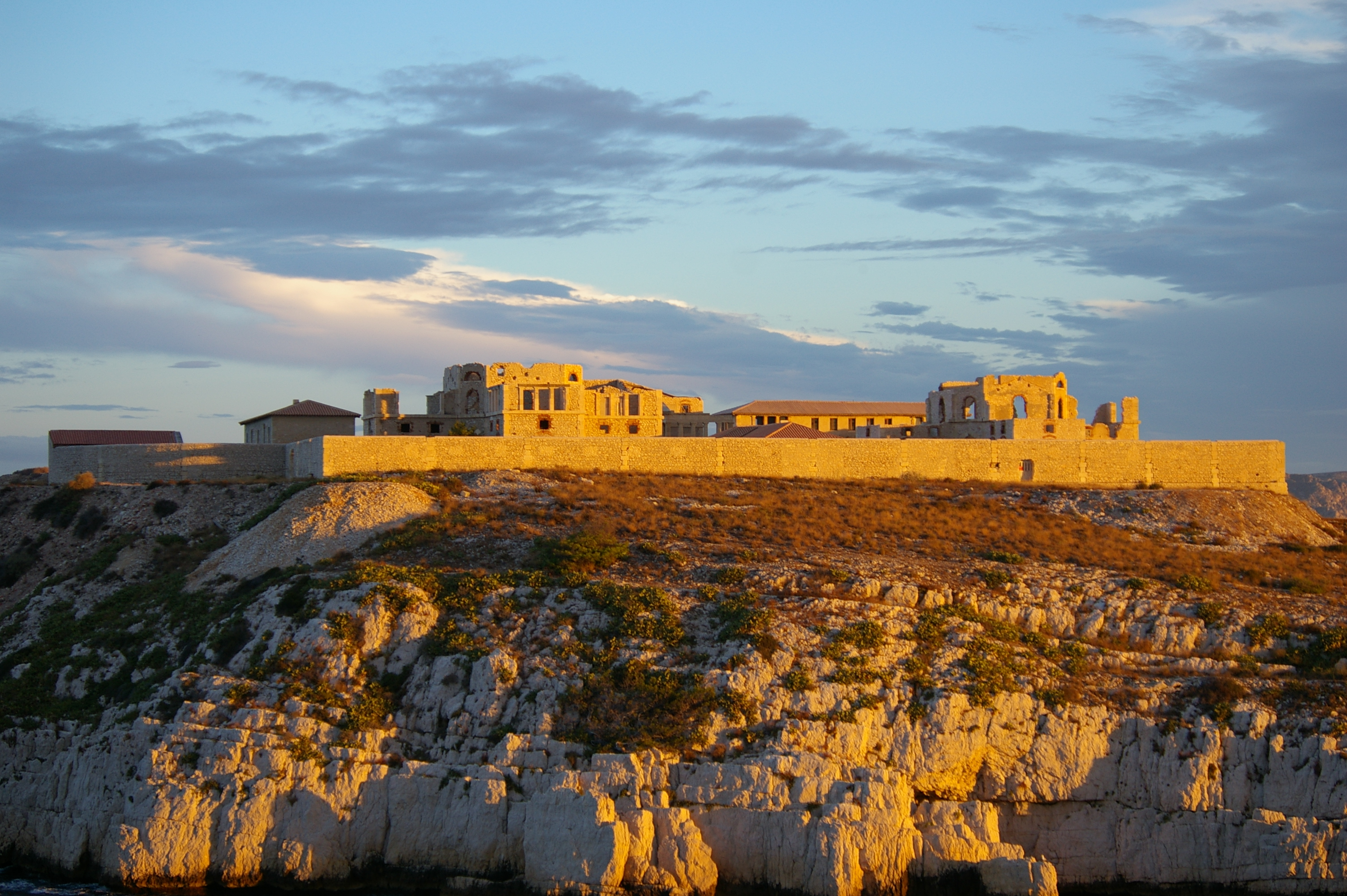 Hôpital Caroline, Îles du Frioul